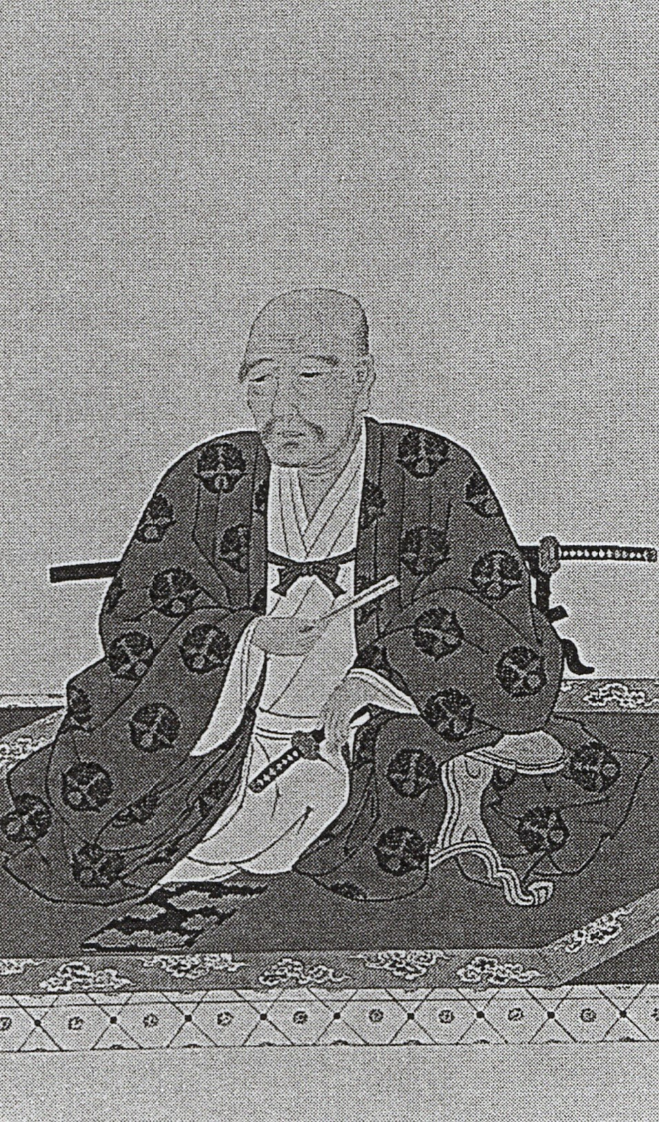 鍋島直与の肖像(モノクロ)。